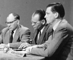 Fernsehstudio Köln Journalistengespräch über die Saarfrage. Die Bundestagsabgeordneten Trittelvitz (SPD) und Eugen Gerstenmaier (CDU) stellten sich dem Kreuzfeuer von vier Journalisten.